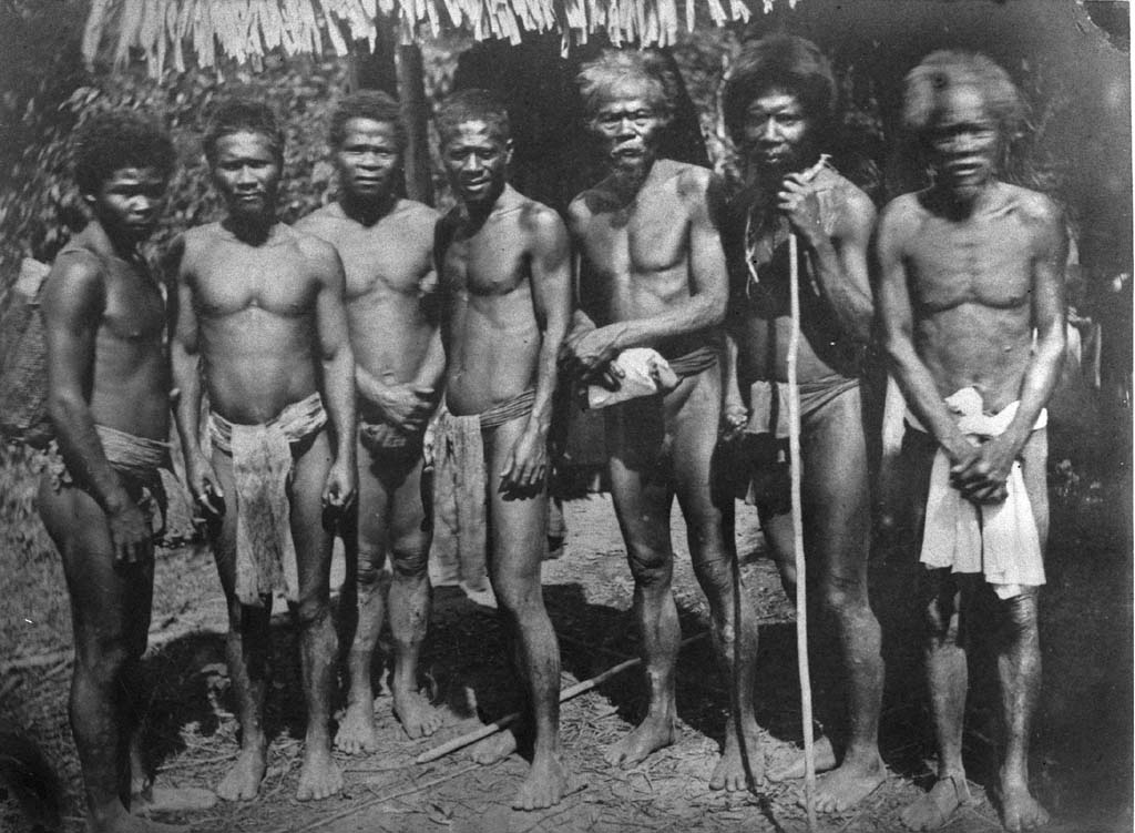 Foto: Groepsportret met lokale bestuurders in Perak